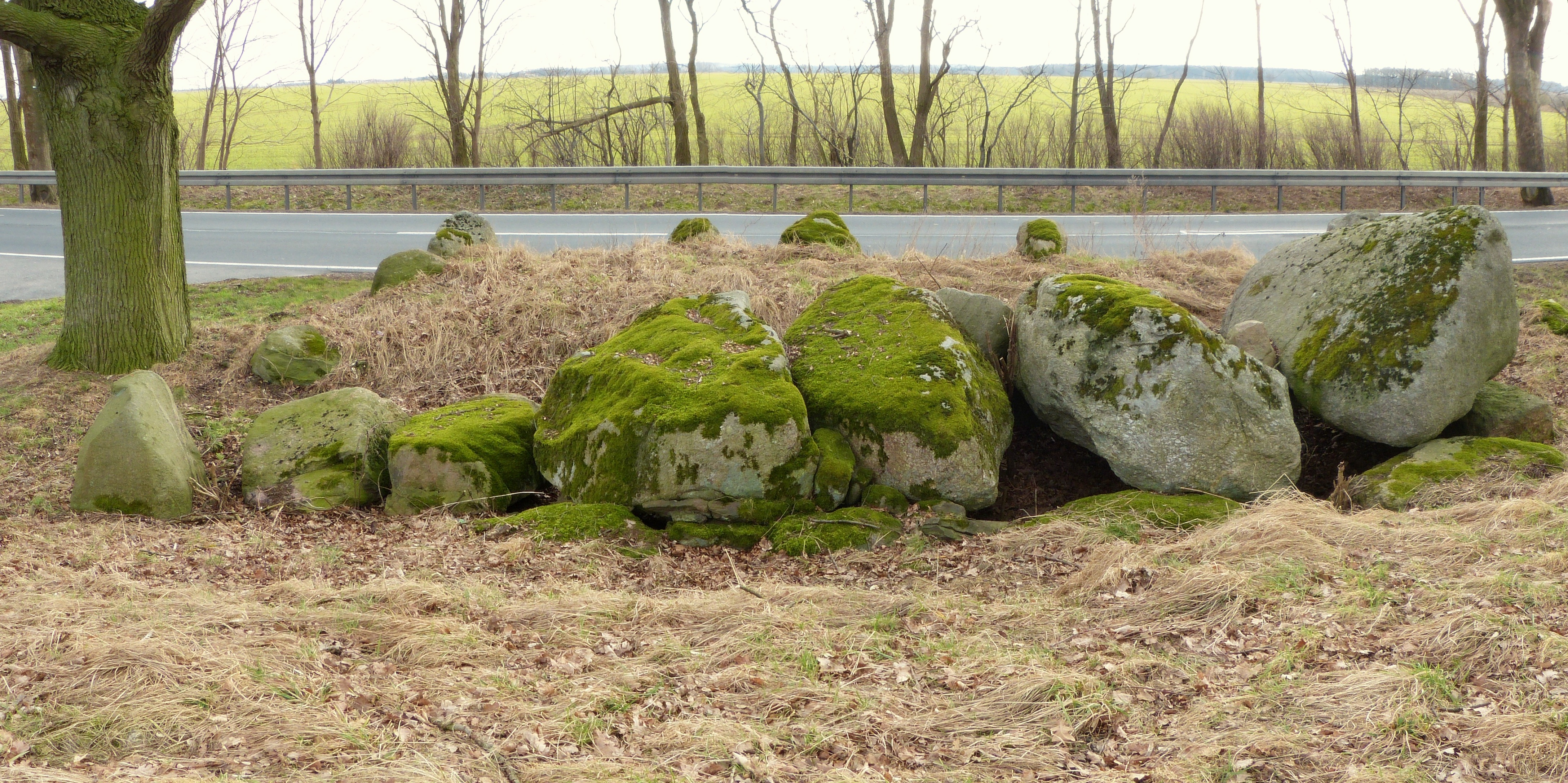 Großsteingrab Kruckow 1, Ansicht des querliegenden Großdolmens von Norden